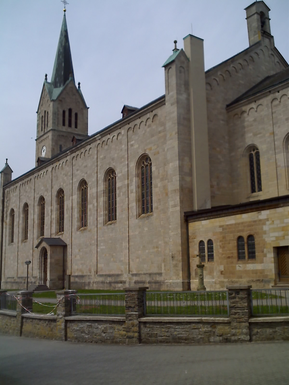 Pfarrkirche in Medebach (Hochsauerlandkreis)